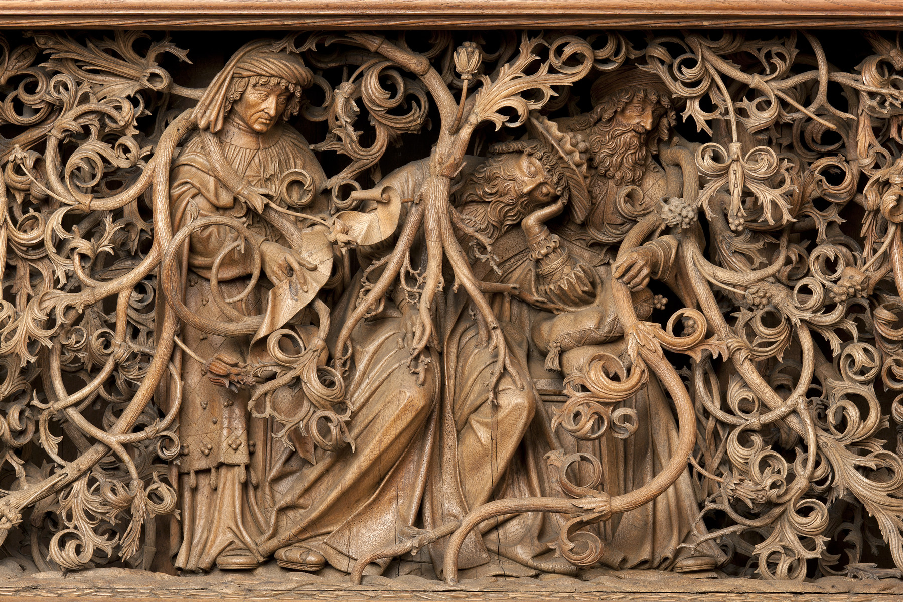 Sieben-Schmerzen-Altar, Jesse mit zwei Propheten